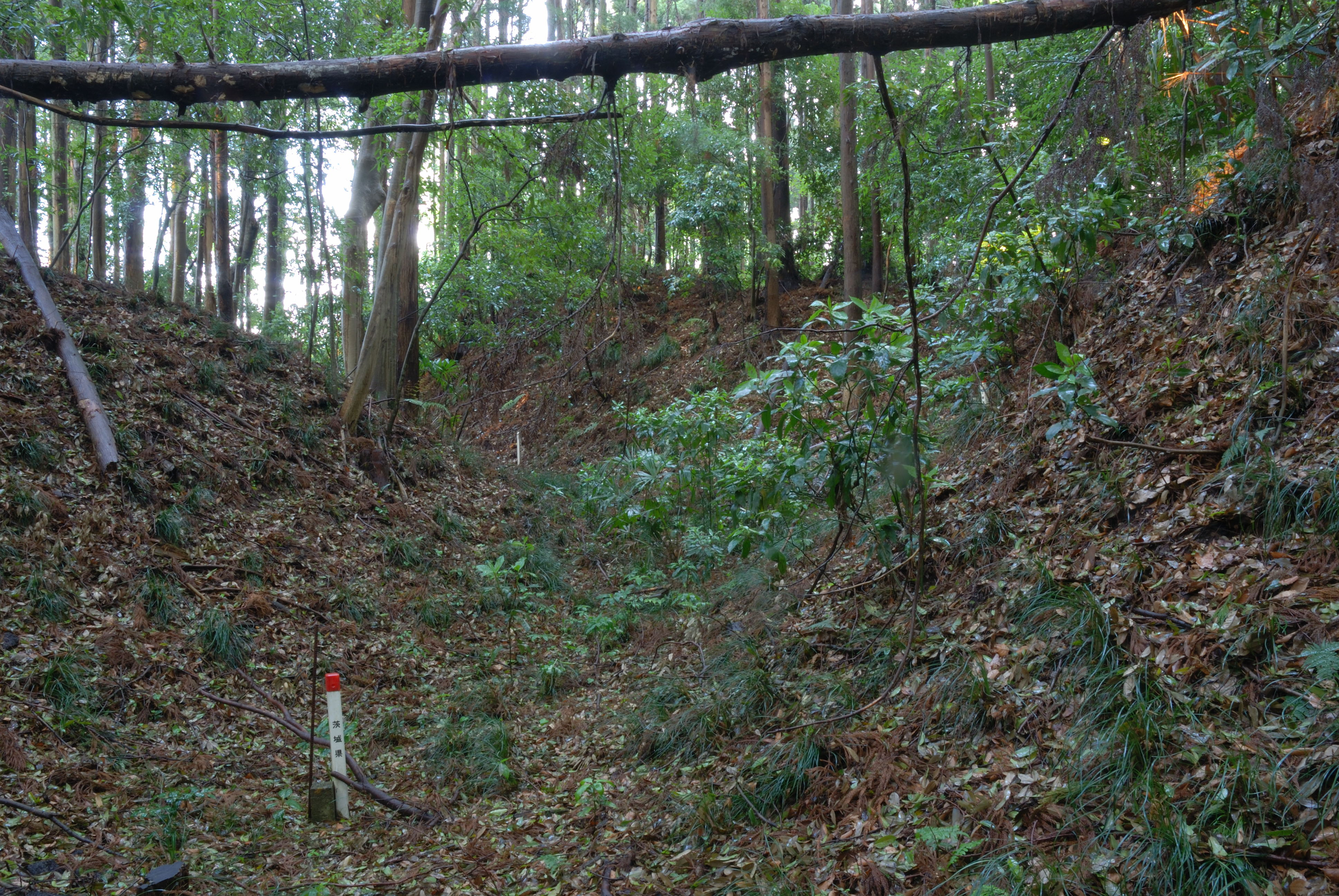 Ichikaku karabori